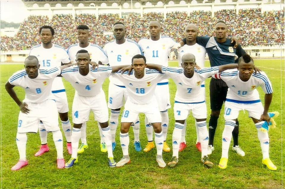 Equipe de la centrafrique